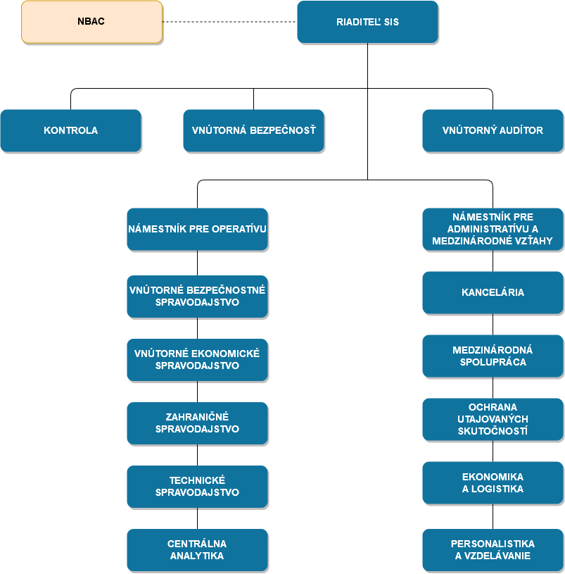 Organizačná štruktúra štátneho orgánu Slovenskej republiky - SIS